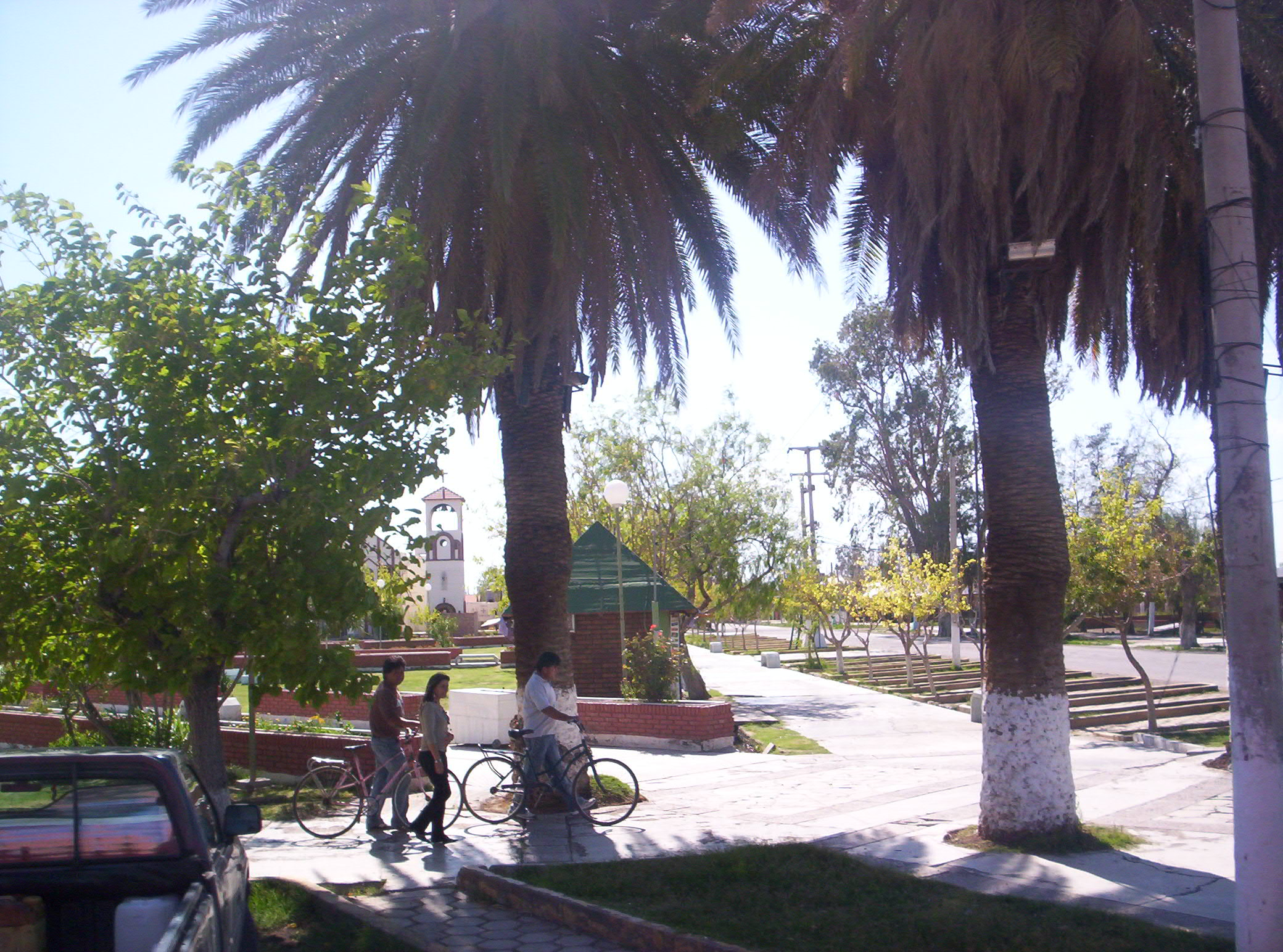 Vista de la plaza Dominguito, en Media Agua, departamento Sarmiento, provincia de San Juan, Argentina